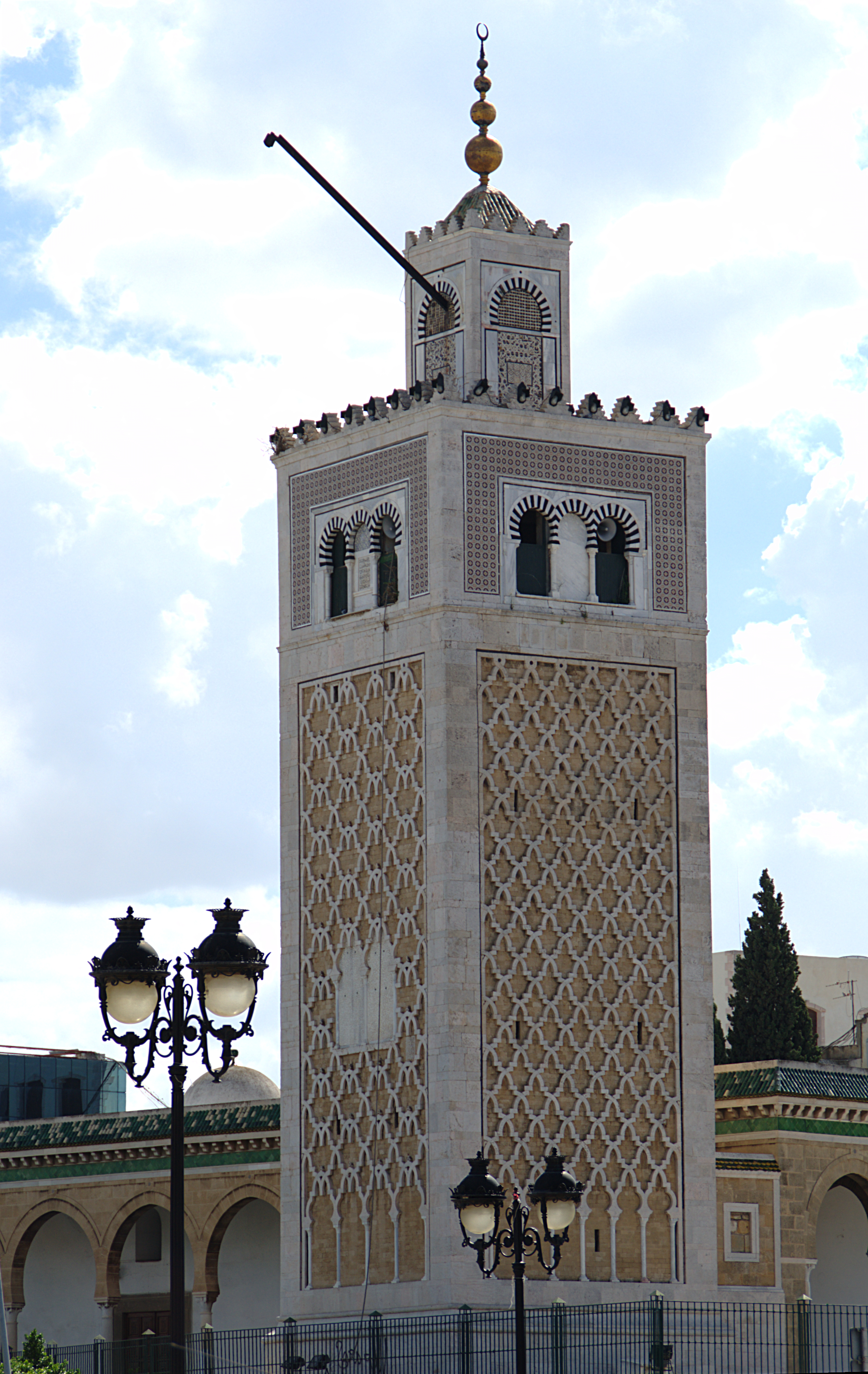 Mosquée de la Casba, Tunis